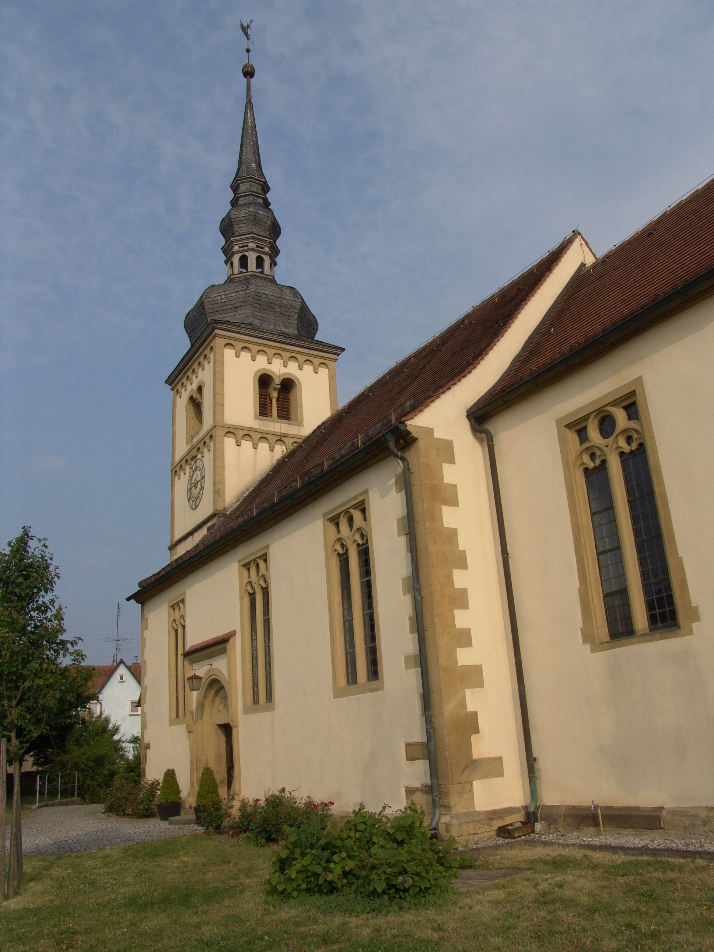 evang.-luth. Kirche St. Johannes in Gnötzheim